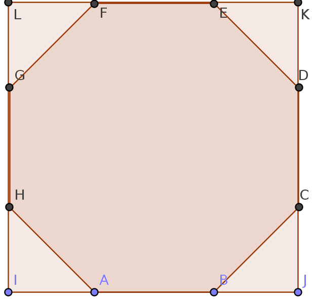 Com es passa d'una planta quadrada a una octogonal mitjançant l'element arquitectònic de la Trompa